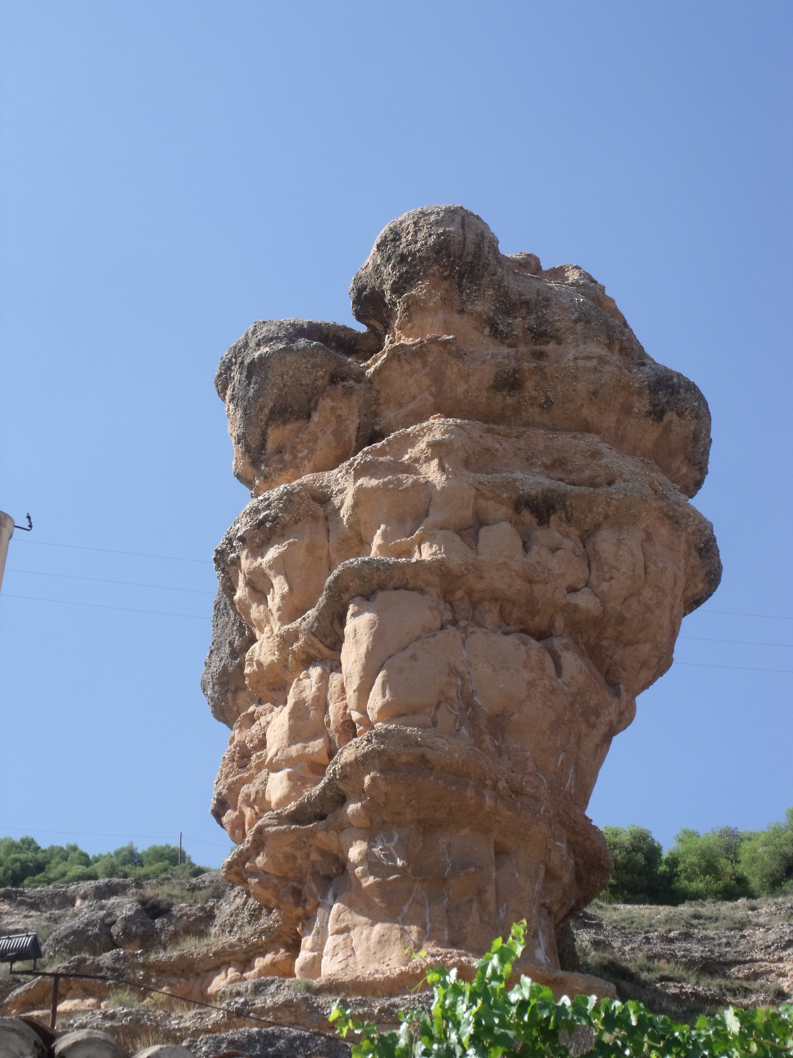 formación geológica tipo mallo que está en el mismo municipio